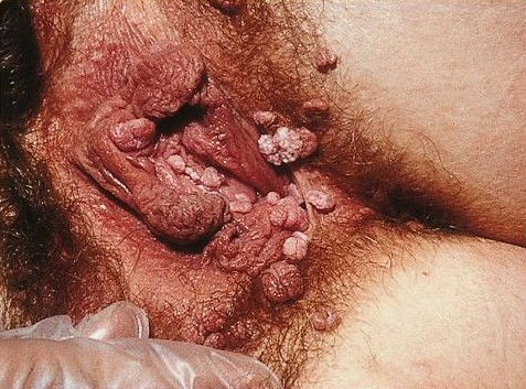 genital warts